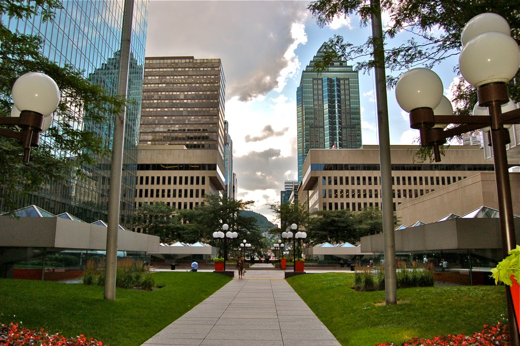 Place Ville-Marie, Montréal